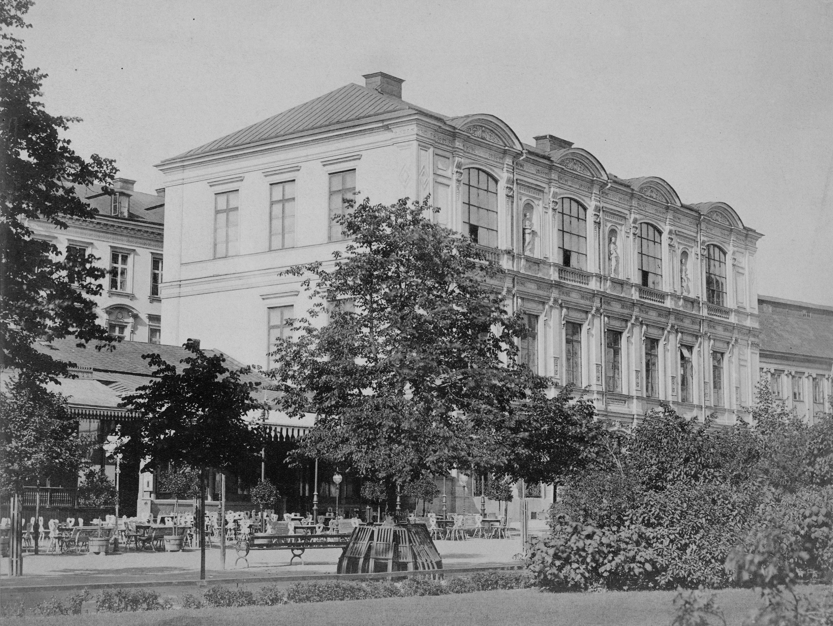 Blanch´s Café, Konstföreningen. Utgiven av: J & C G Bolinders Mekaniska Verkstads AB